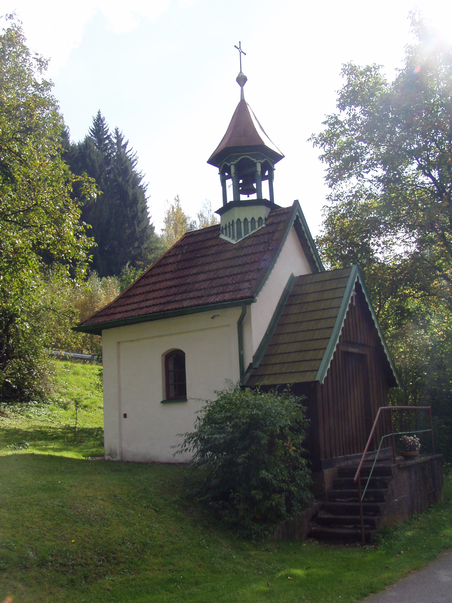 Kaple Panny Marie Královny